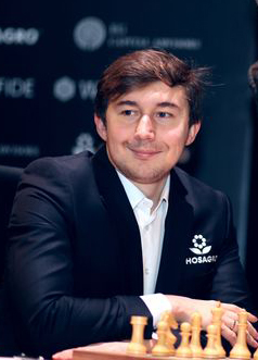 Сергей Карякин, Турнир Претендентов 2018